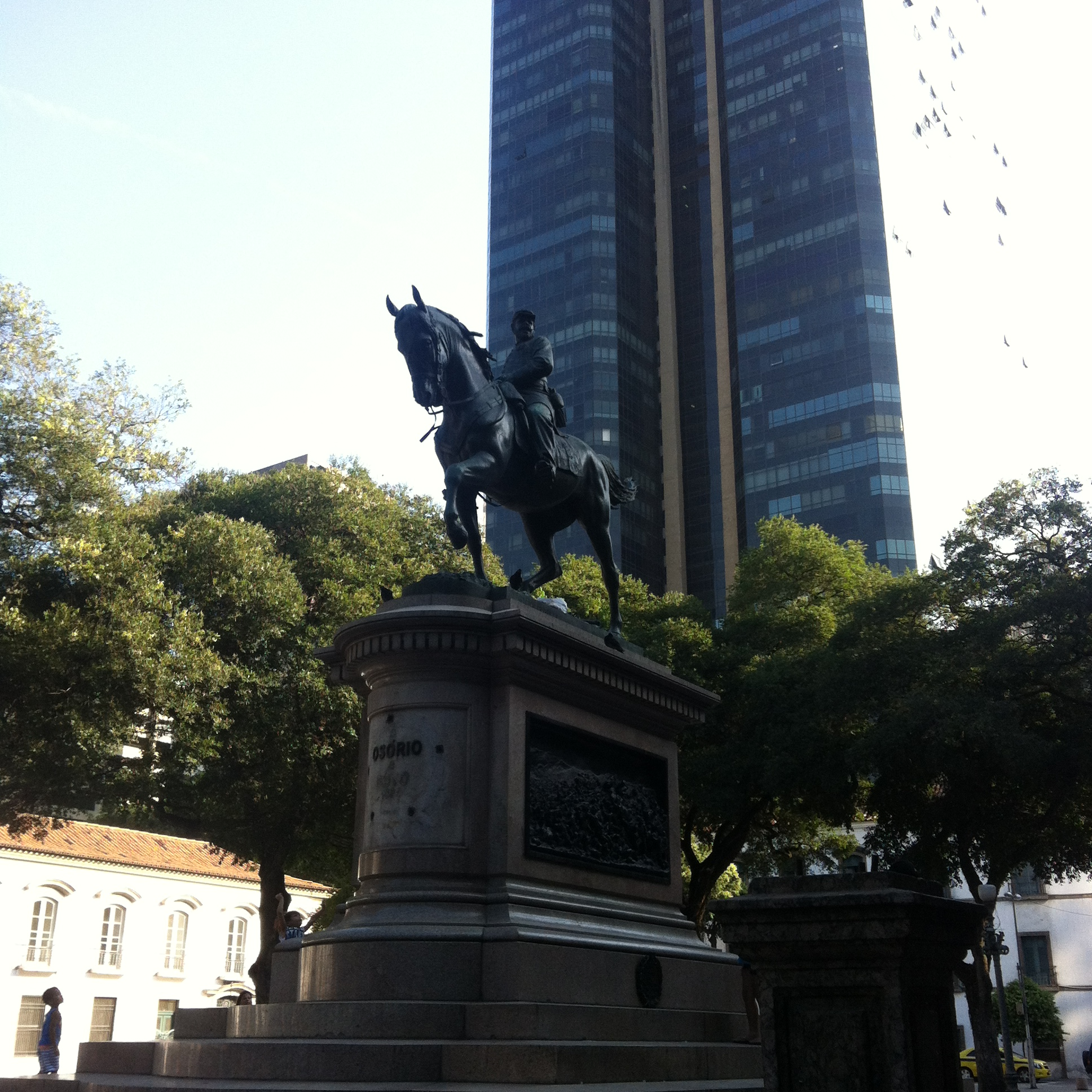 Área central da Praça Quinze de Novembro e imediações